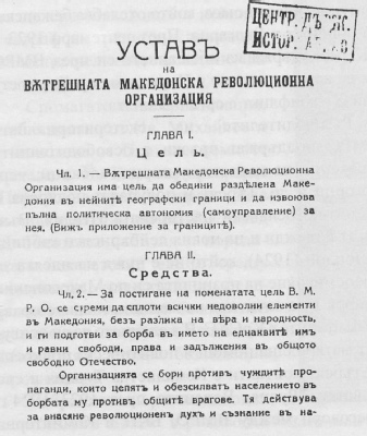 Устав на ВМРО от 1928 година.